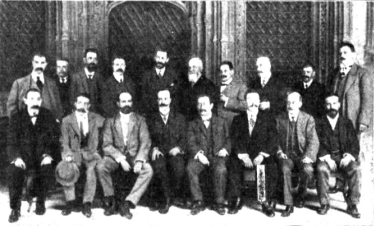 Fotografía de los parlamentarios catalanes que defendieron el proyecto de Mancomunidad de Cataluña en 1911